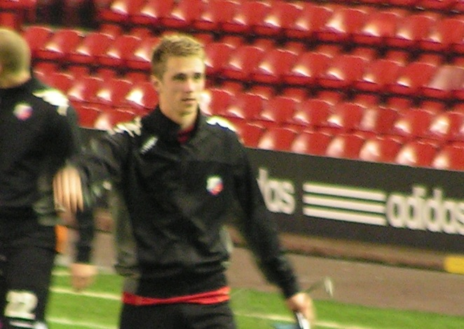 Nederlands voetballer Leon de Kogel